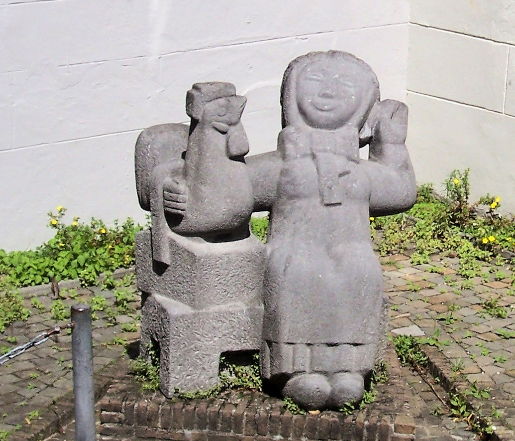 's-Hertogenbosch - Zoete lieve Gerritje (1958) door Leo Geurtjens